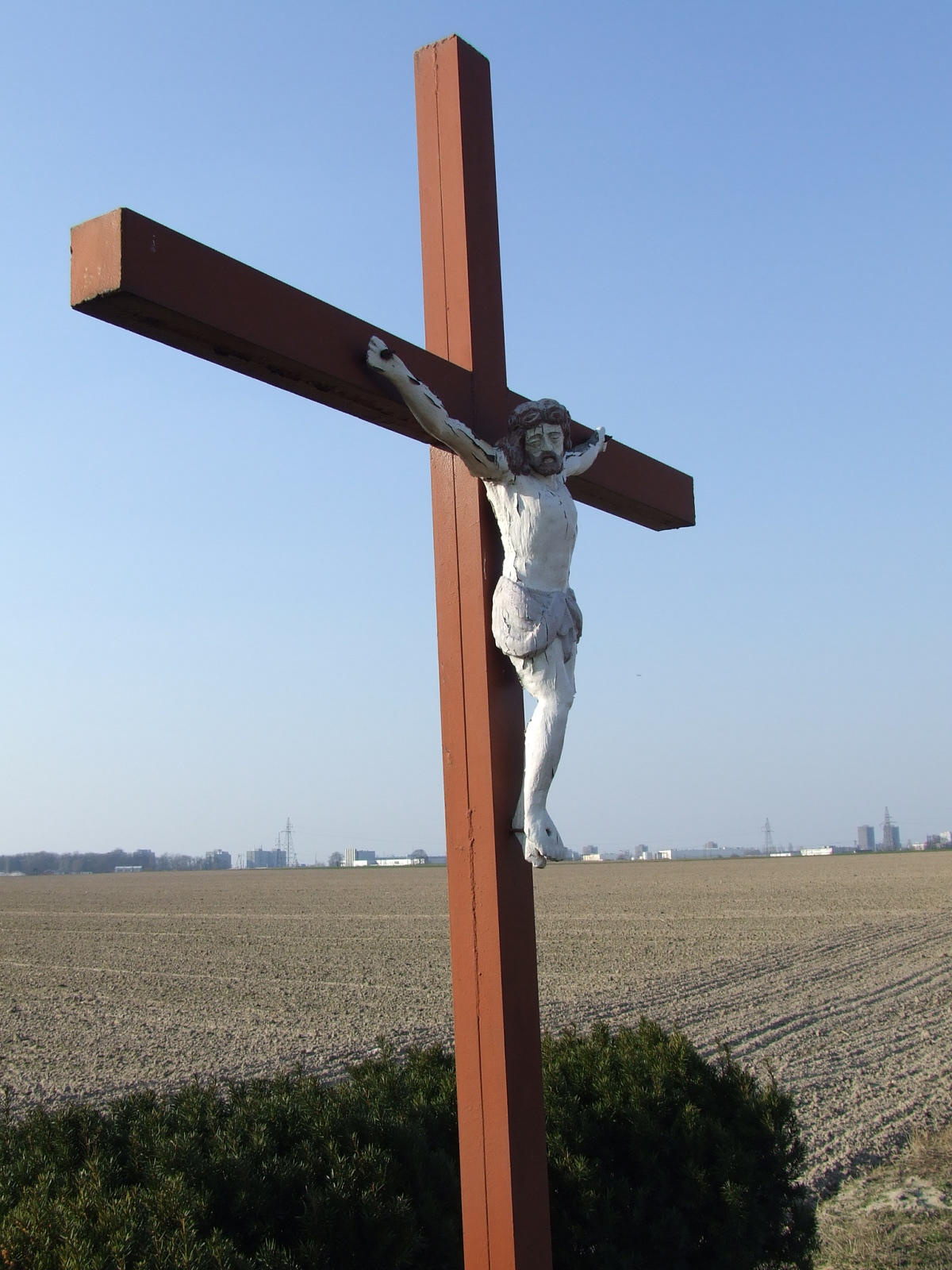 Krzyż znajmujący sie przy ul. Garaszewo na osiedlu GARASZEWO w południowo - wschodniej części Poznania (Wielkopolska)